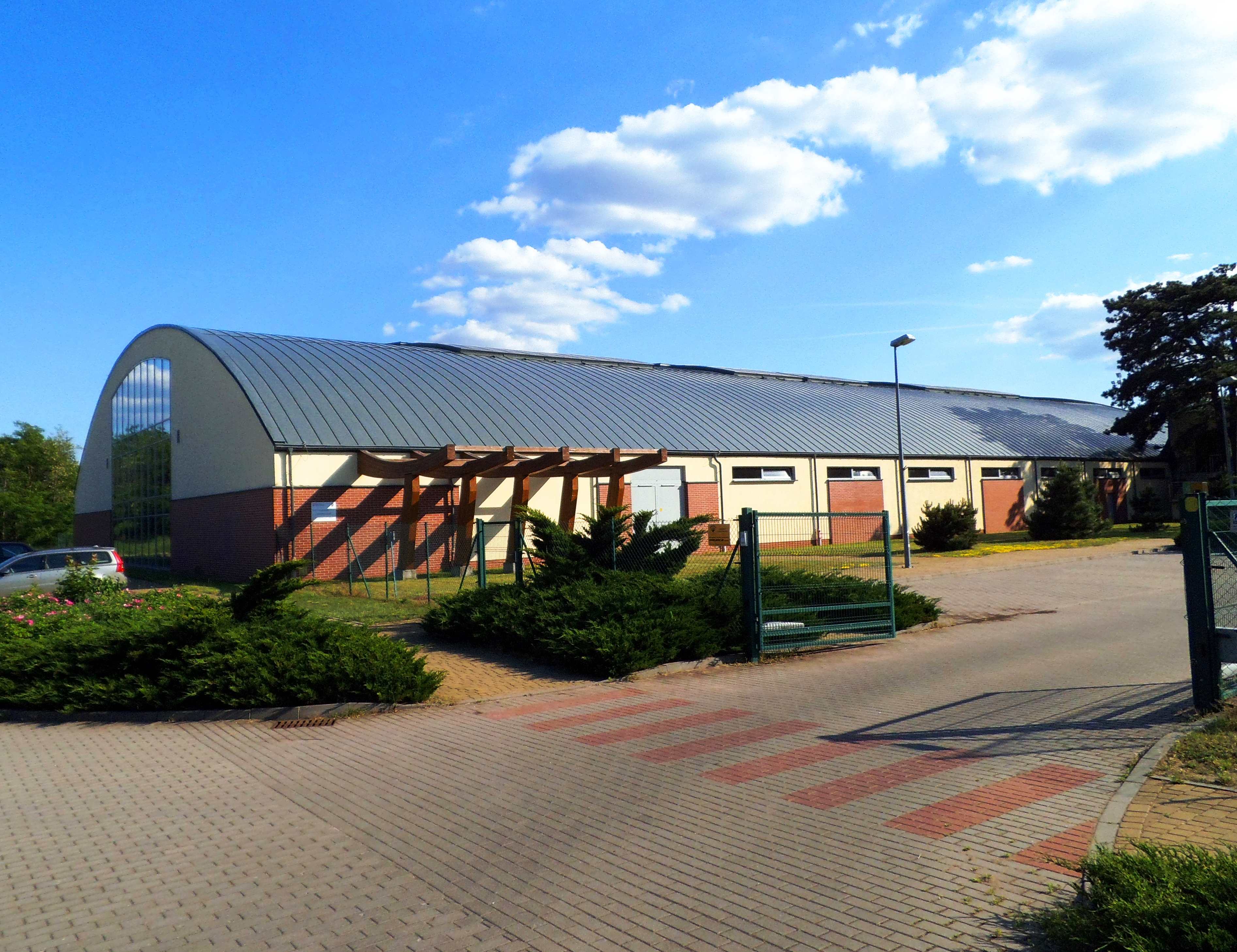 Hala tenisowa przy ul. Przy Skarpie 4 w Toruniu